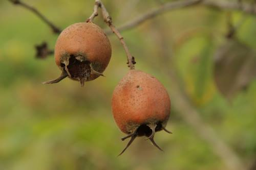 Ahoudasht-Sari-Mazandaran-Iran